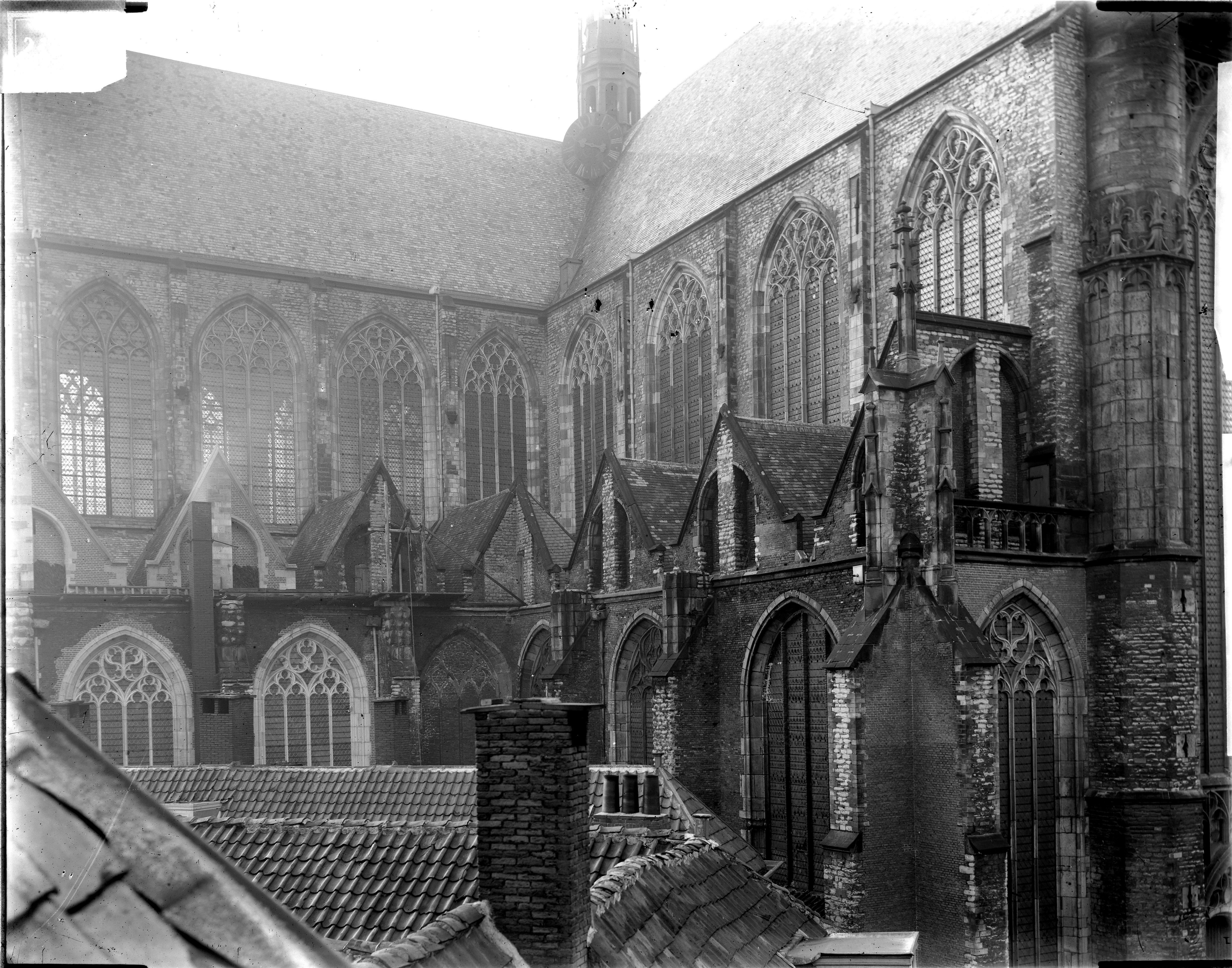 Noordertransept oostzijde. Detail van het muurwerk en de ramen.